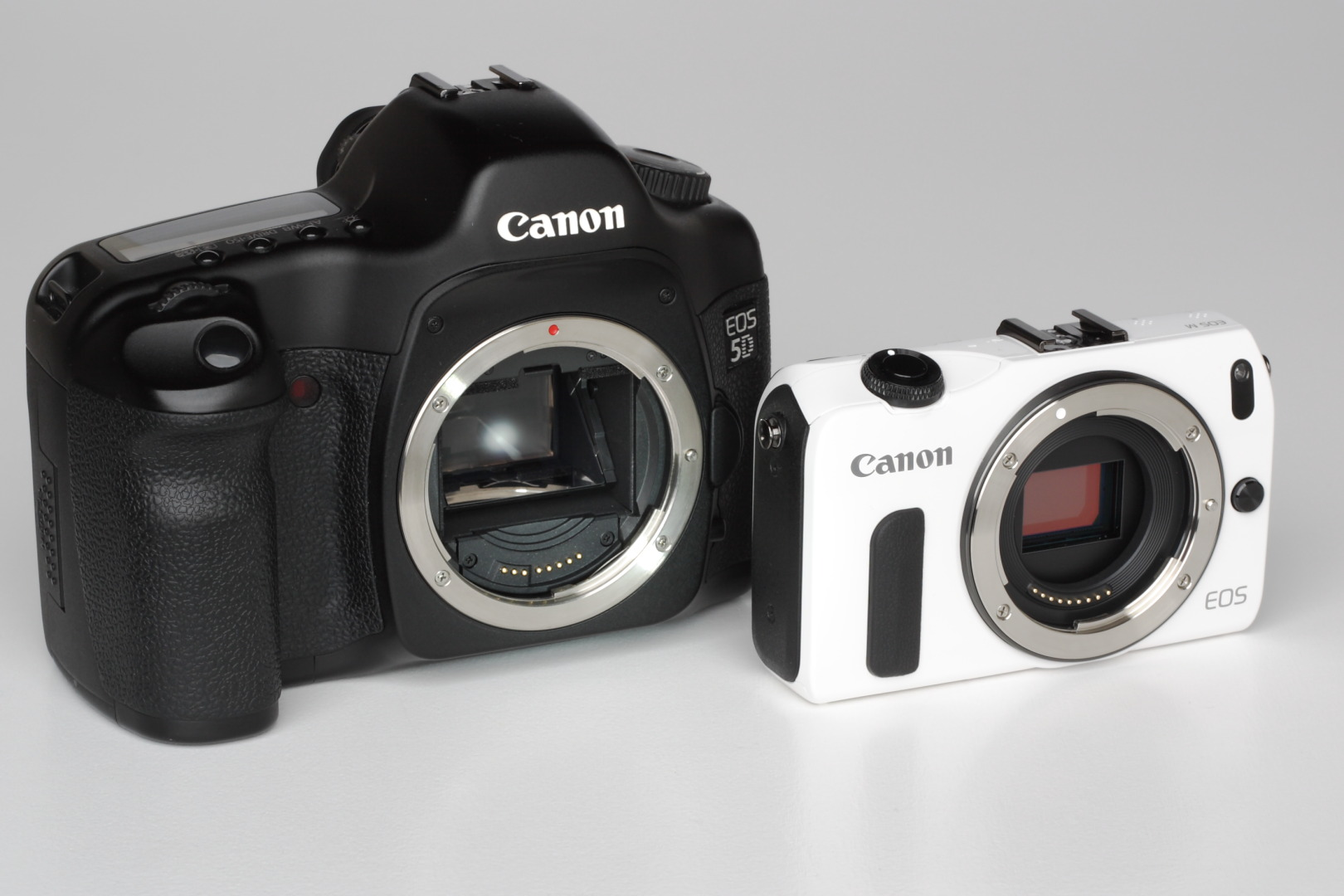 Canon EOS 5D und EOS M ohne Objektiv